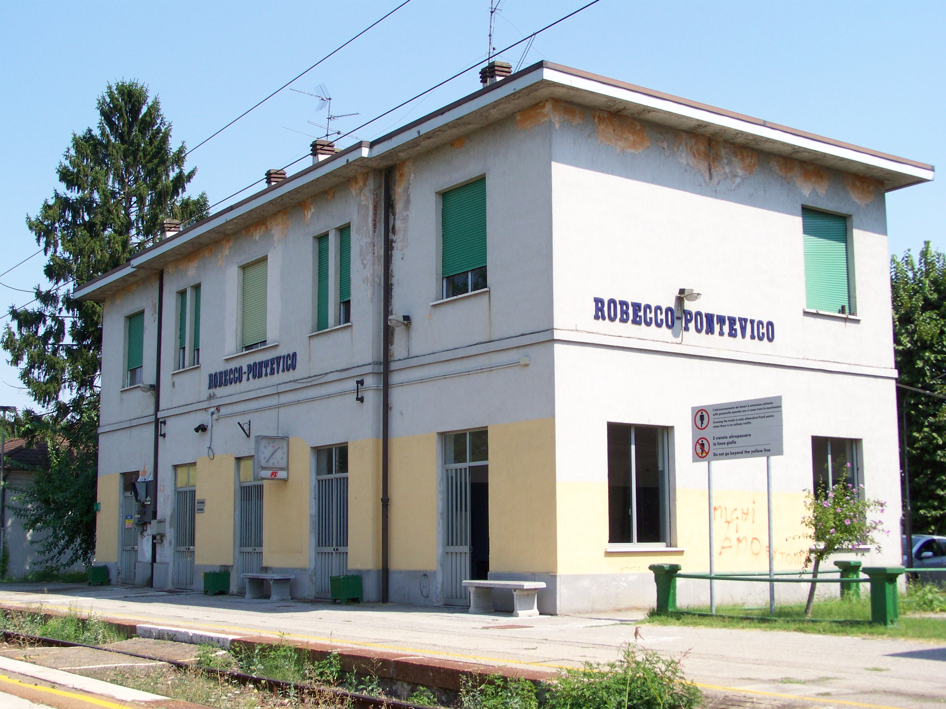 Lato ferrovia del fabbricato viaggiatori della stazione di Robecco-Pontevico sulla ferrovia Brescia-Cremona a Robecco d'Oglio.